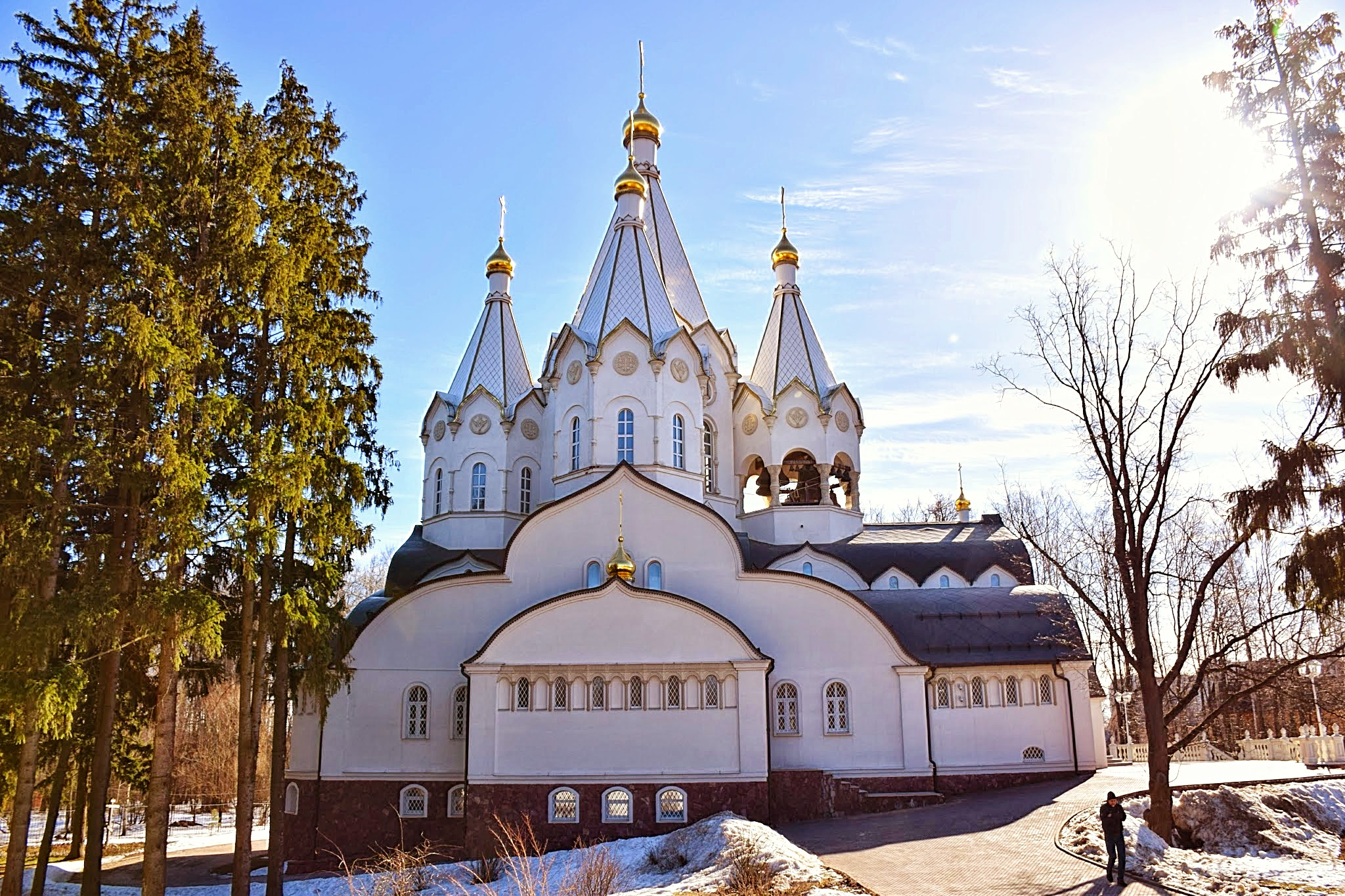 Бутовский полигон: Юбилейная улица, Дрожжино, Ленинский район, Московская область